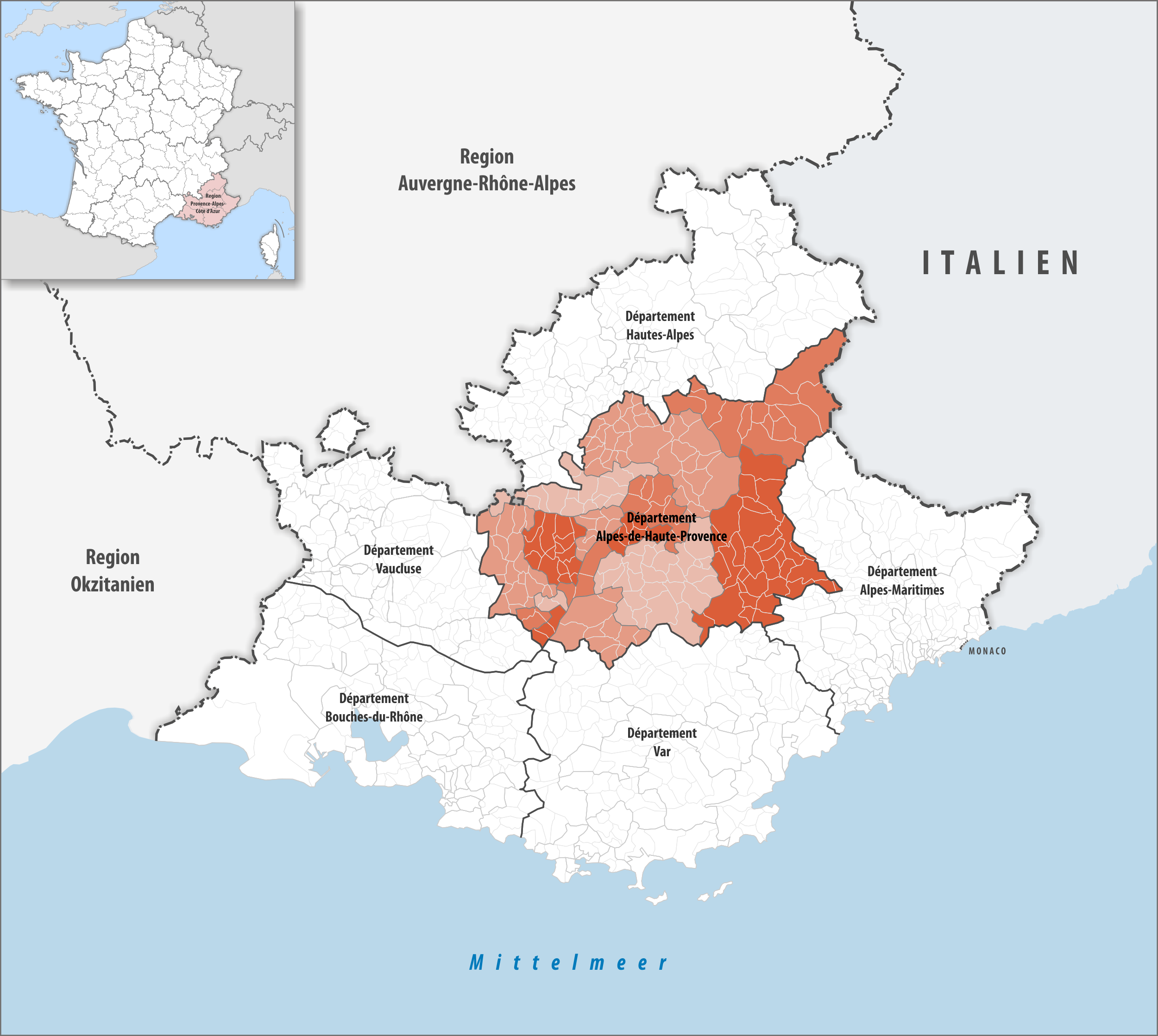 Lage des Departements Alpes-de-Haute-Provence